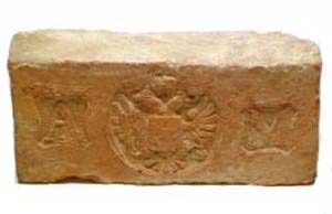 Ziegel aus der Fertigung Alois Miesbach